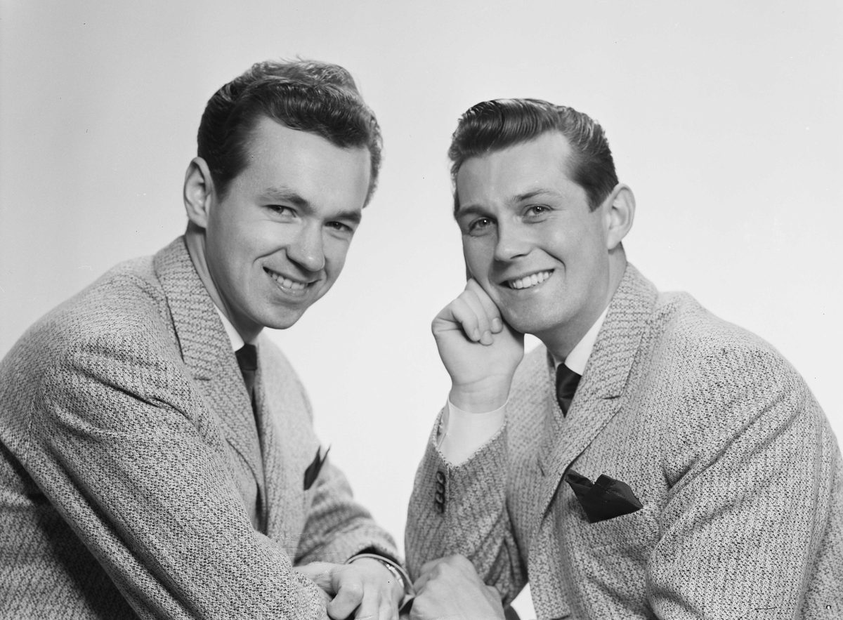 Kjell og Odd var en kristen duo som var aktive i Norge på 1950- og 60-tallet. Den bestod av Kjell Andreassen (trekkspill og sang) og Odd Bergum (gitar og sang).